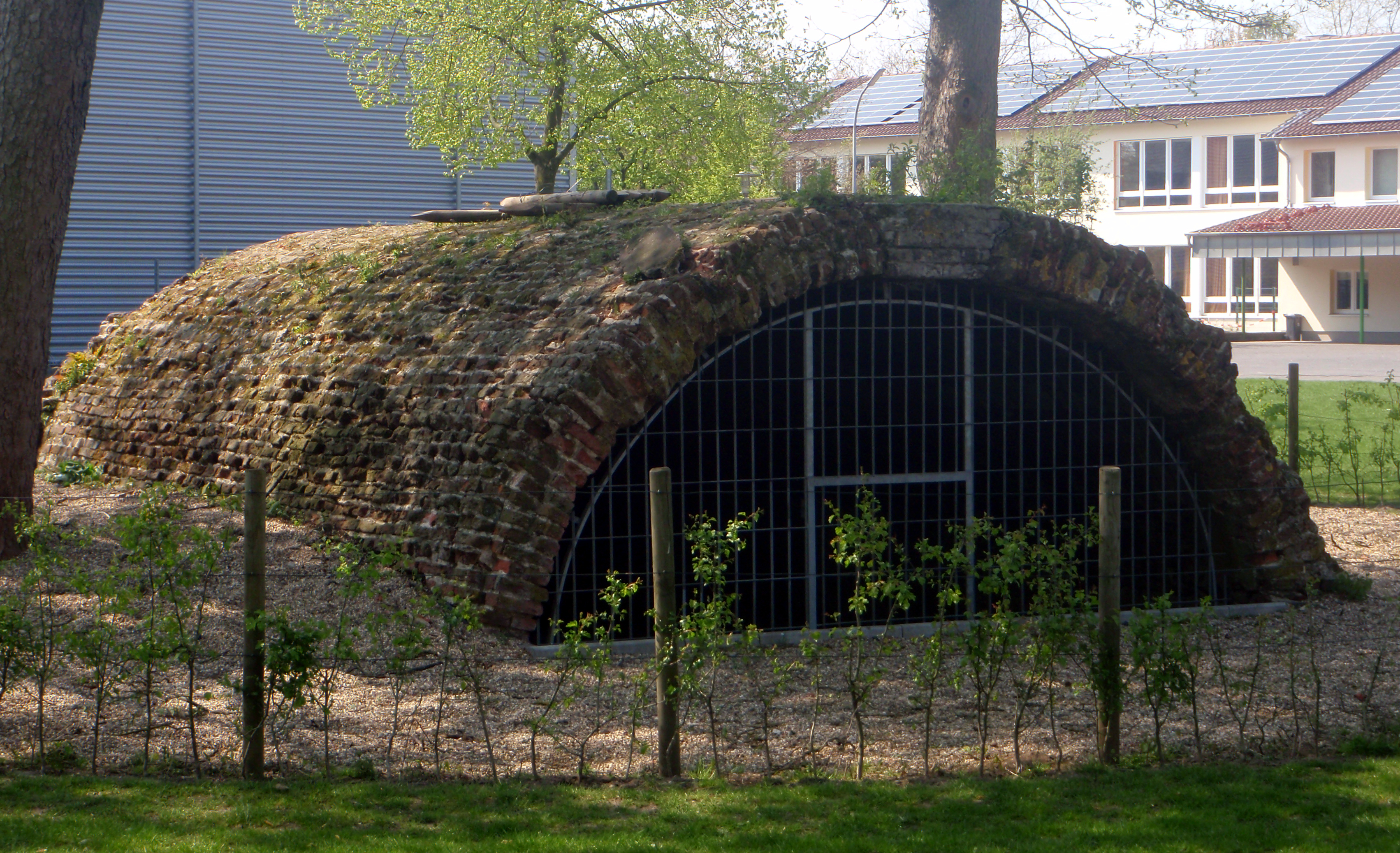 Das abgebildete Tonnengewölbe ist neben dem Torhaus und einem Ravelin eines der wenigen Relikte der geschleiften Zitadelle der Ludgerusburg in Coesfeld.